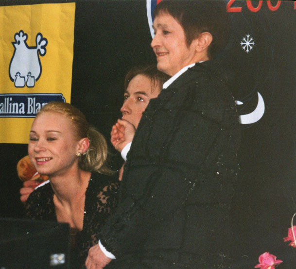 Julia Obertas & Sergei Slawnow mit ihrer Trainerin Tamara Moskwina während der Russischen Meisterschaften 2004